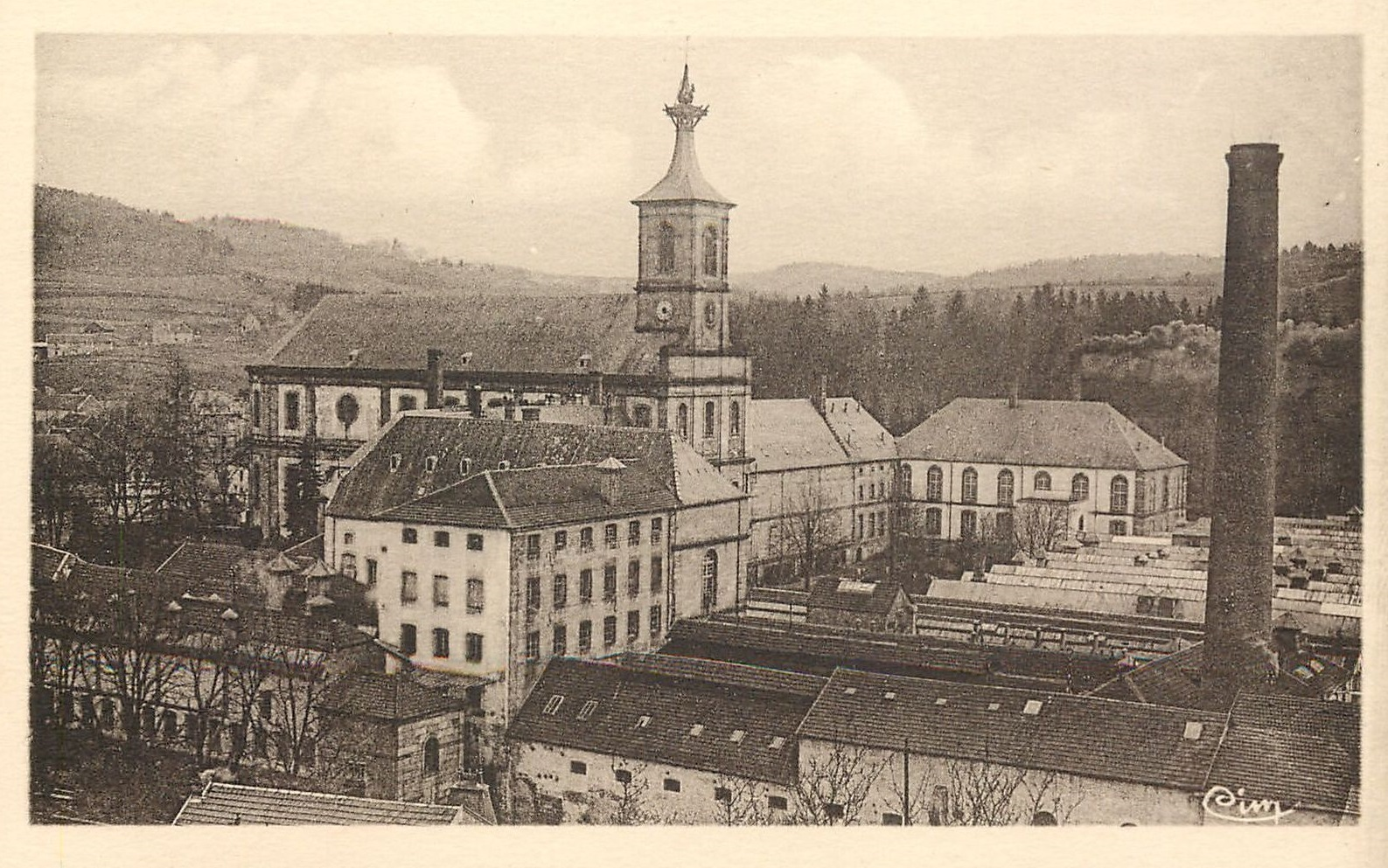 abbaye de Moyenmoutier avec l'usine textile construite devant l'édifice au cours du XXème siècle